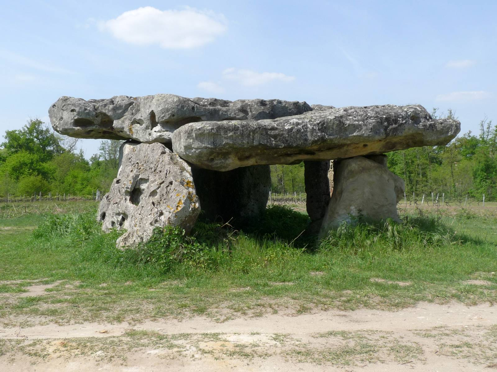 dolmen de Garde-Epée, St-Brice, Charente, France